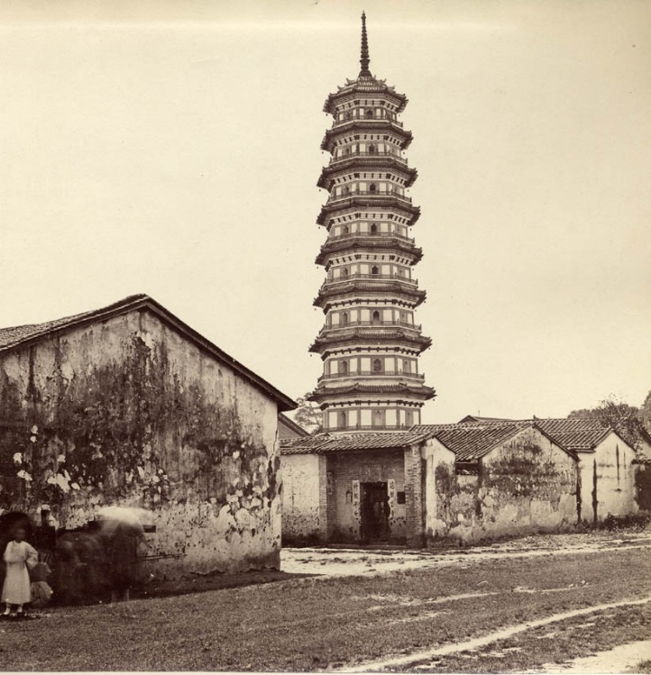 十九世紀八十年代重修後的花塔。